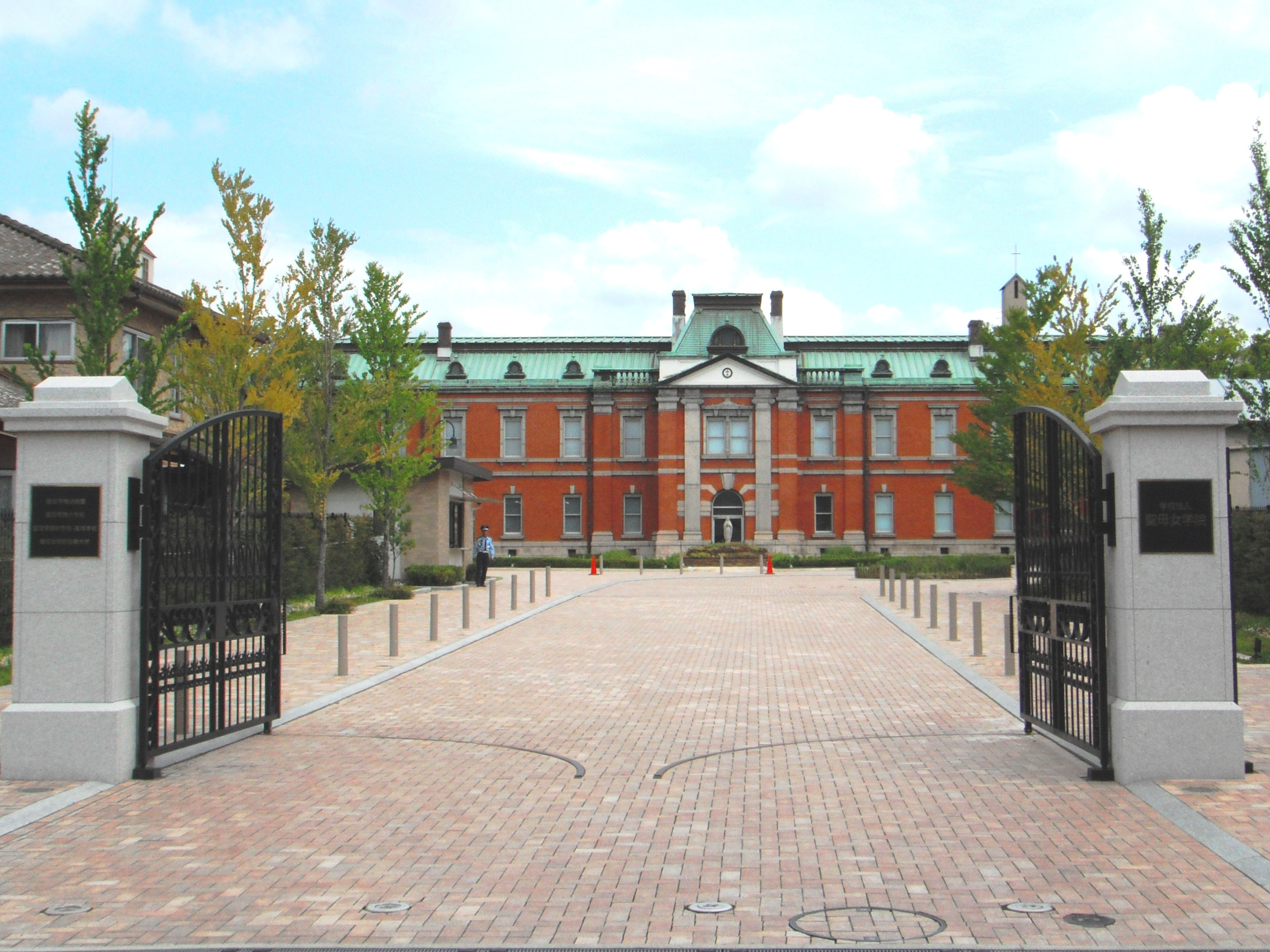 Kyoto Seibo Gakuin, Fushimi-Ku, Kyoto, Japan. Built in 1908